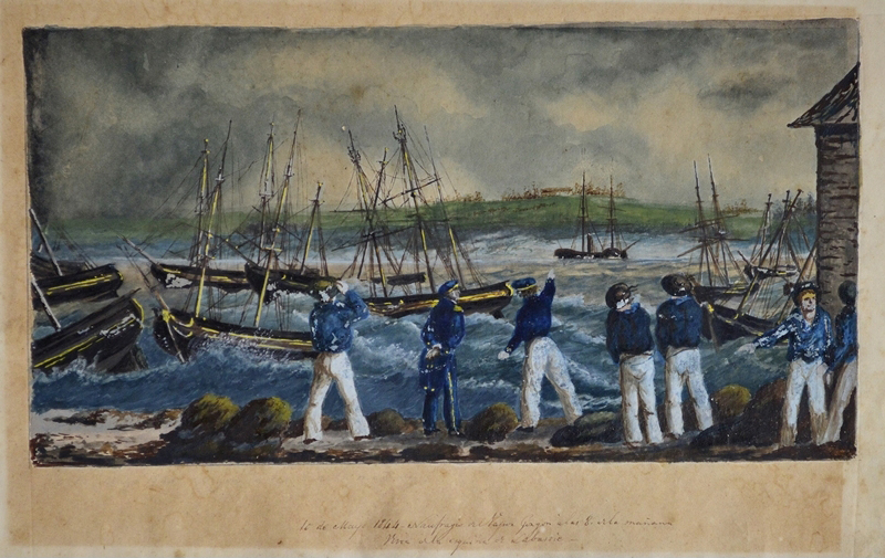 Acuarela de Juan Manuel Besnes e Irigoyen que trata del encallamiento del vapor inglés "Goron" en las costas de Montevideo el 10 de mayo de 1844.